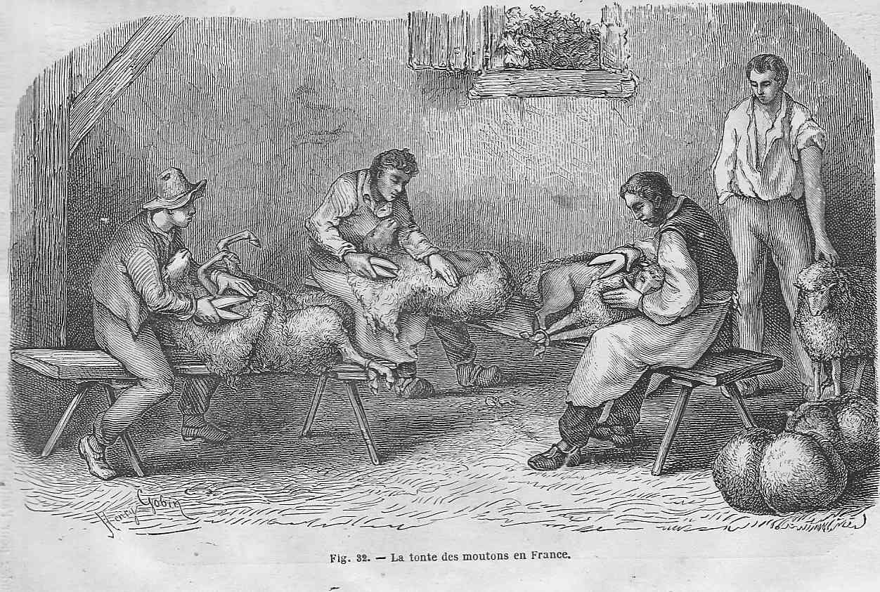 Tonte manuelle des moutons - 1877